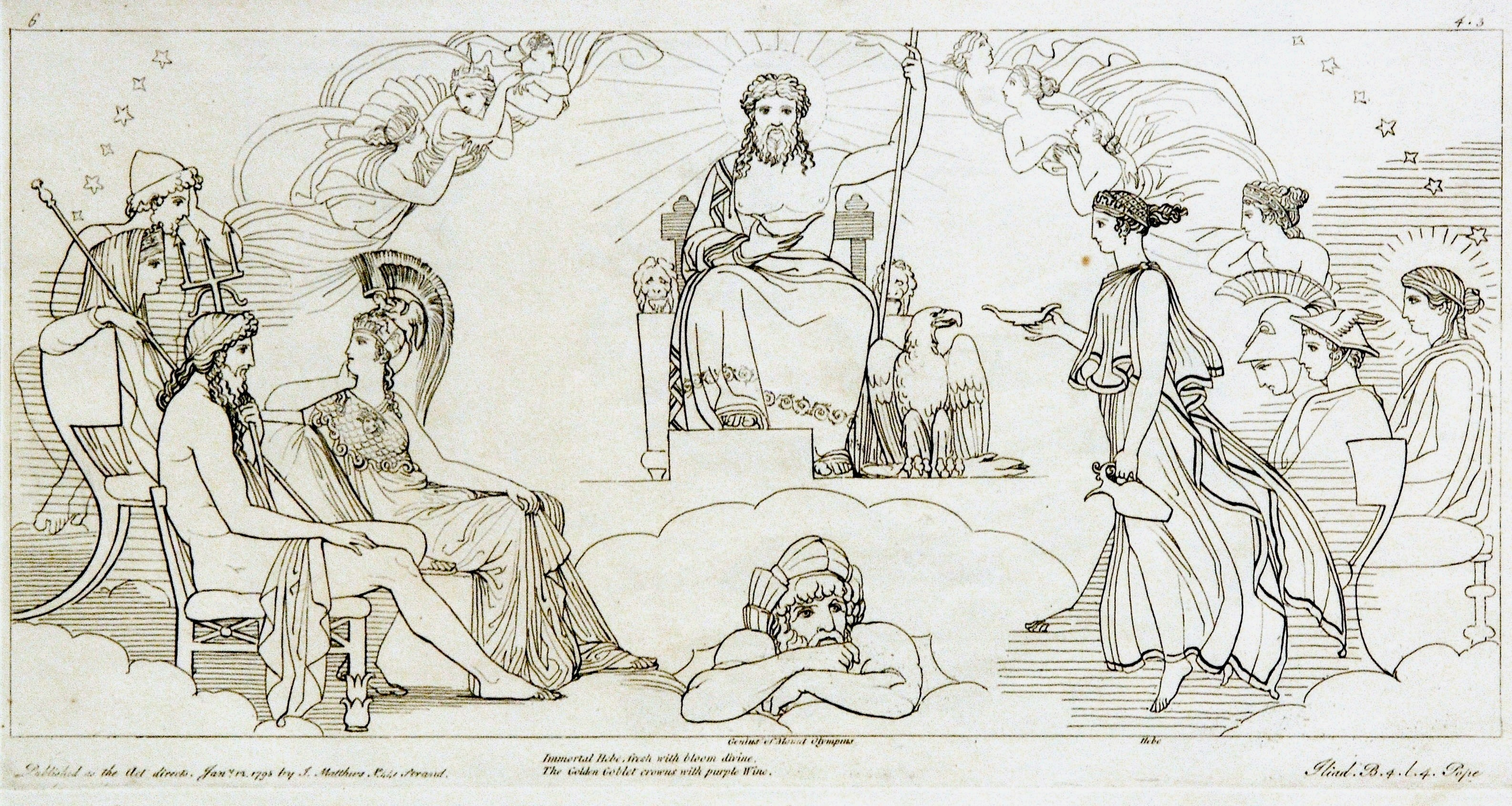 Kupferstich (1795) von Tommaso Piroli (1752 – 1824) nach einer Zeichnung (1793) von John Flaxman (1755 – 1826).